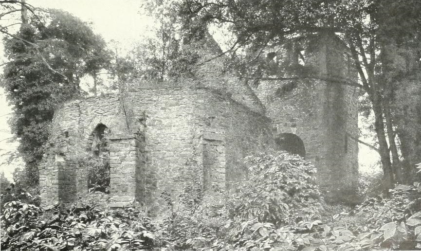 Sylvesterkapelle (Bochum), 1903